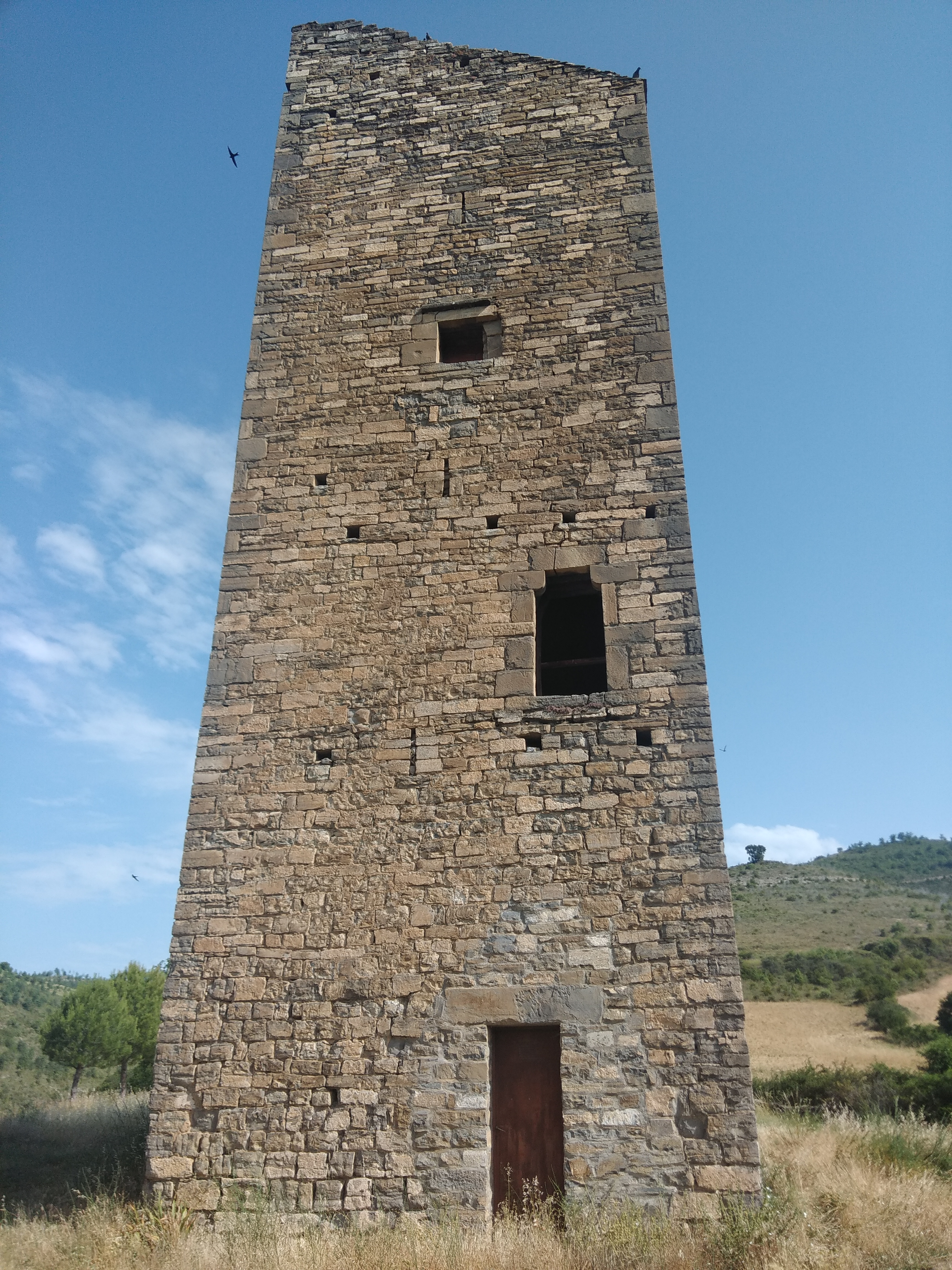 Majones, Huesca, España, Torre militar, siglo XV